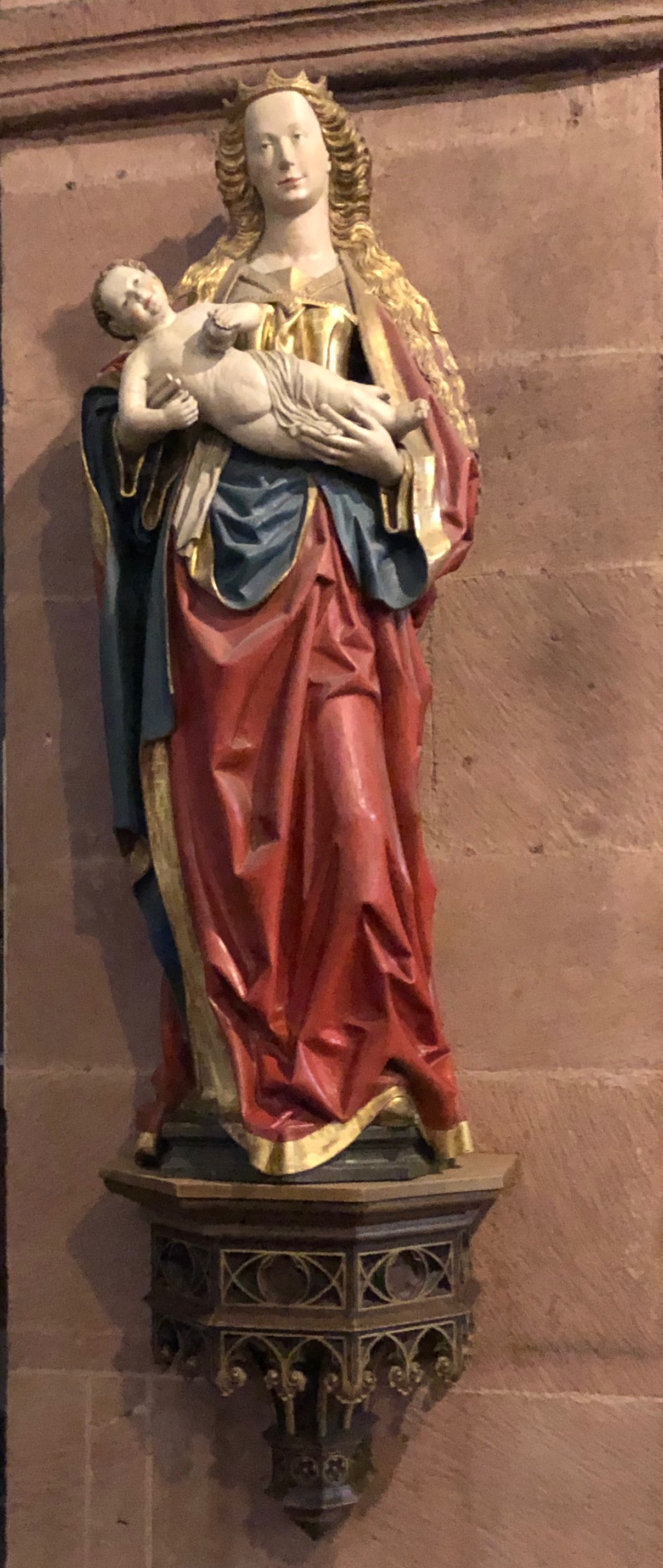 Madonna mit Kind aus Kloster Steinfeld, Eifel